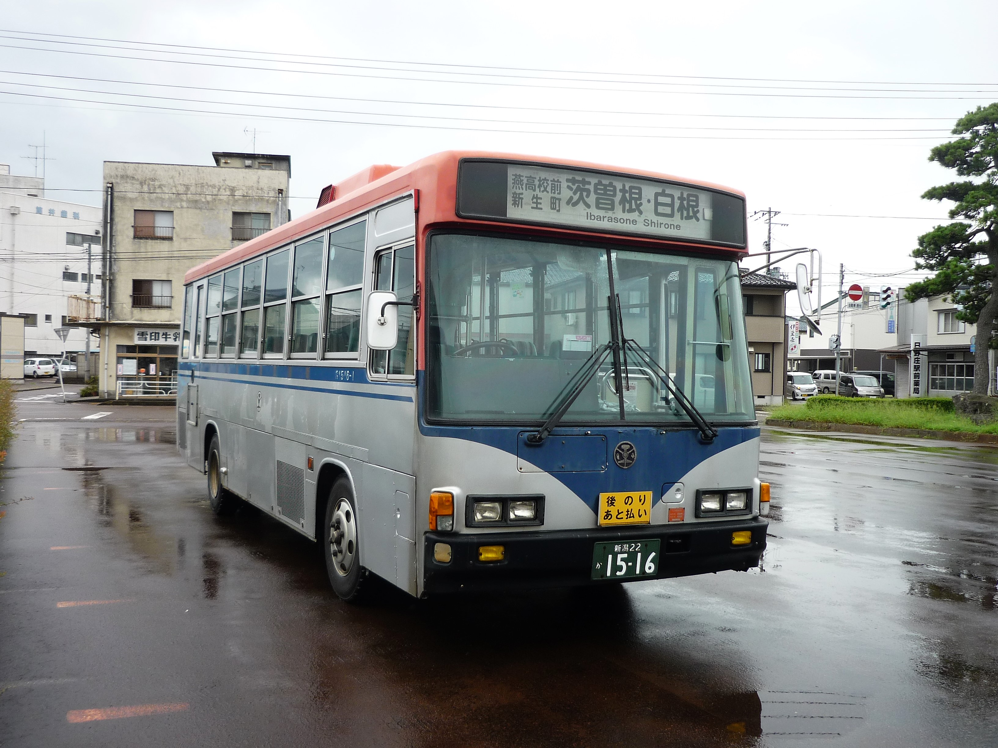 燕駅前に停車中の新潟交通観光バス茨曽根線